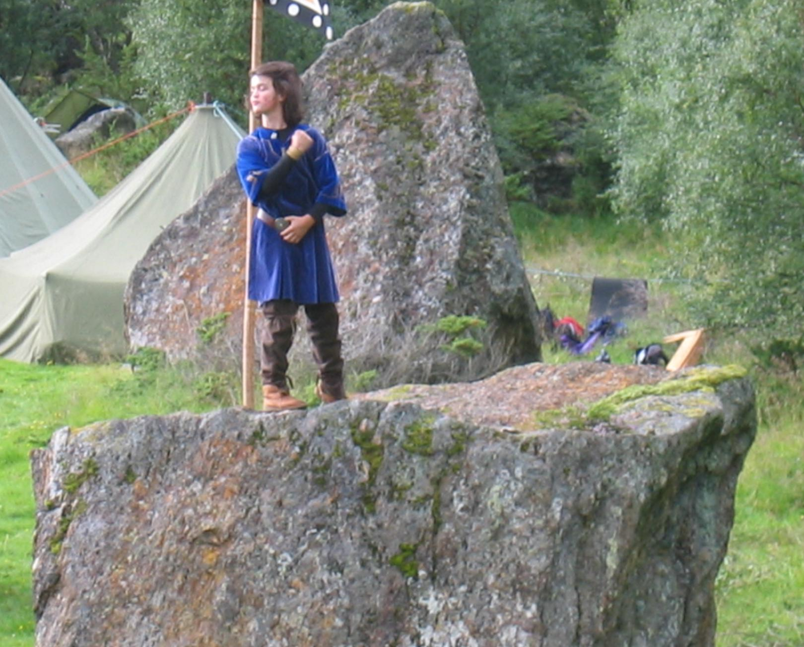 Steigen Sagaspill 2005 Trym (Arne Martin Schrøder) kveder et kvad på talersteinen. Bilde tatt av Marie Pedersen med Bruker:ThorRune's kamera.